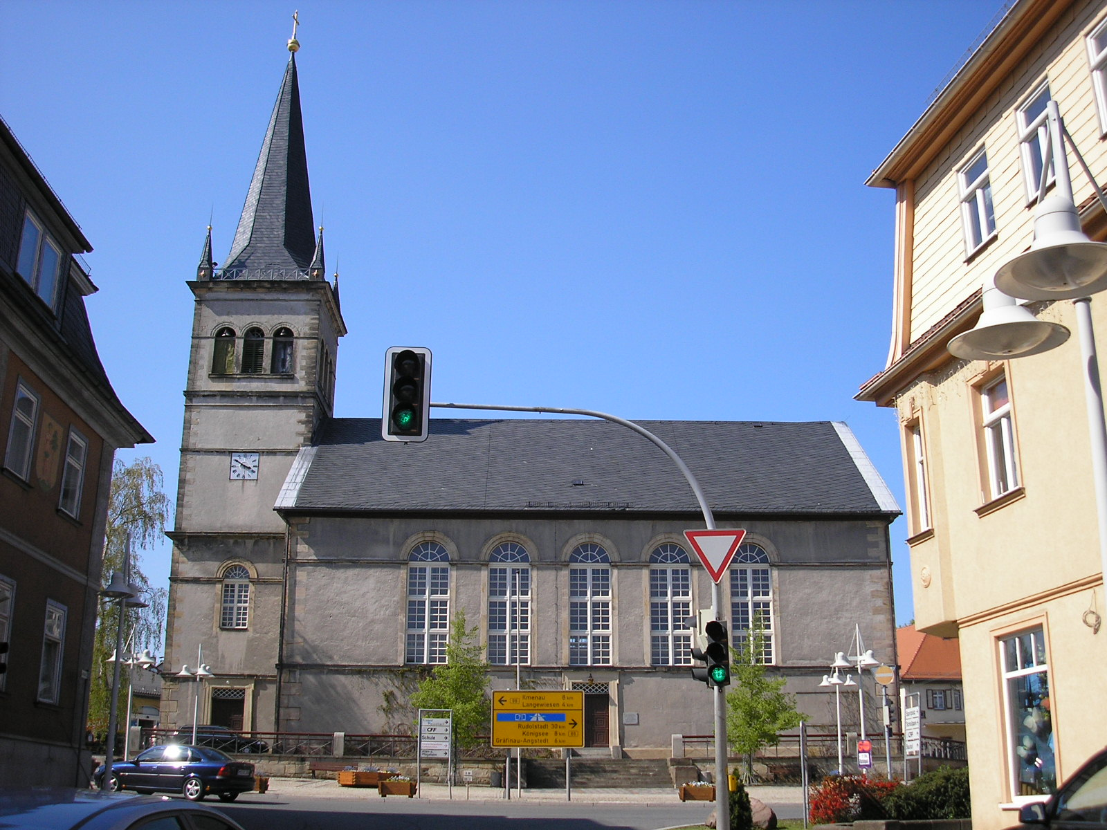 Stadtkirche St. Michael von Gehren (Thüringen).